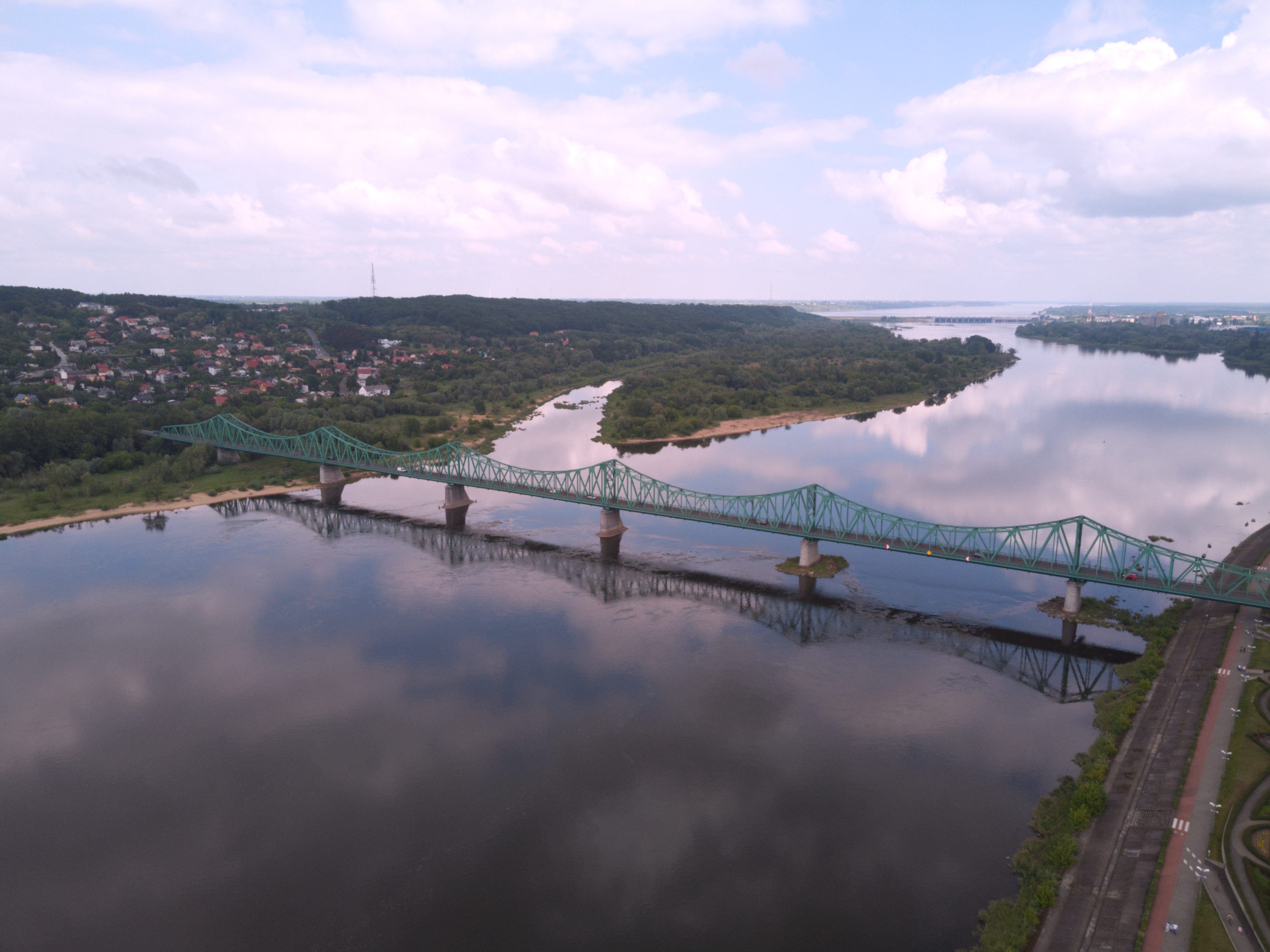 Wisła (2020 r.)